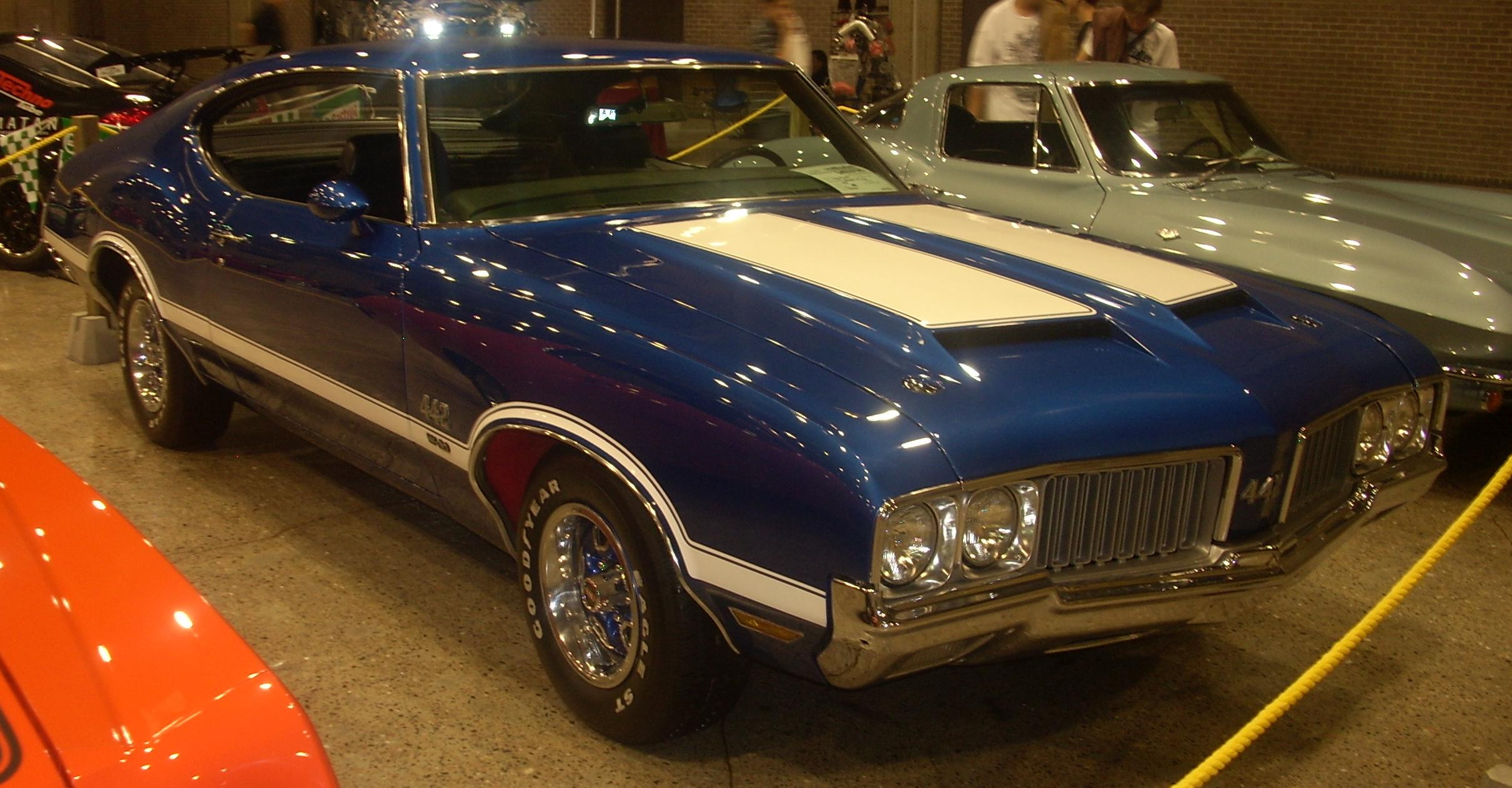 1970 Oldsmobile 442 photographed at Auto classique Montréal 2008.